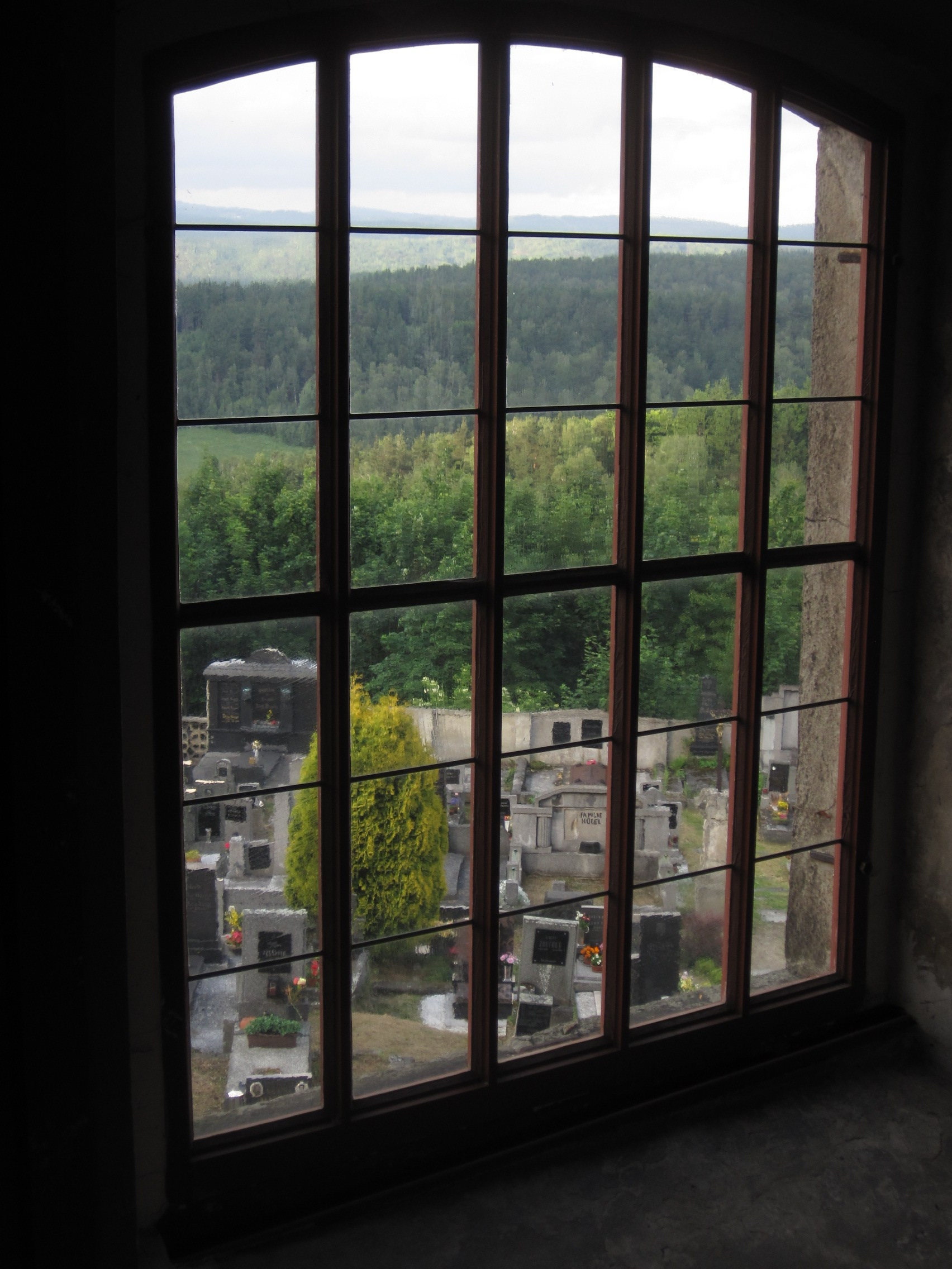 Kostel svatého Vavřince, Dlouhý Most.